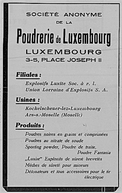 Annonce "Poudrerie de Luxembourg" publiée au "Luxembourg - journal du matin", édition du 19/20 juin 1937.